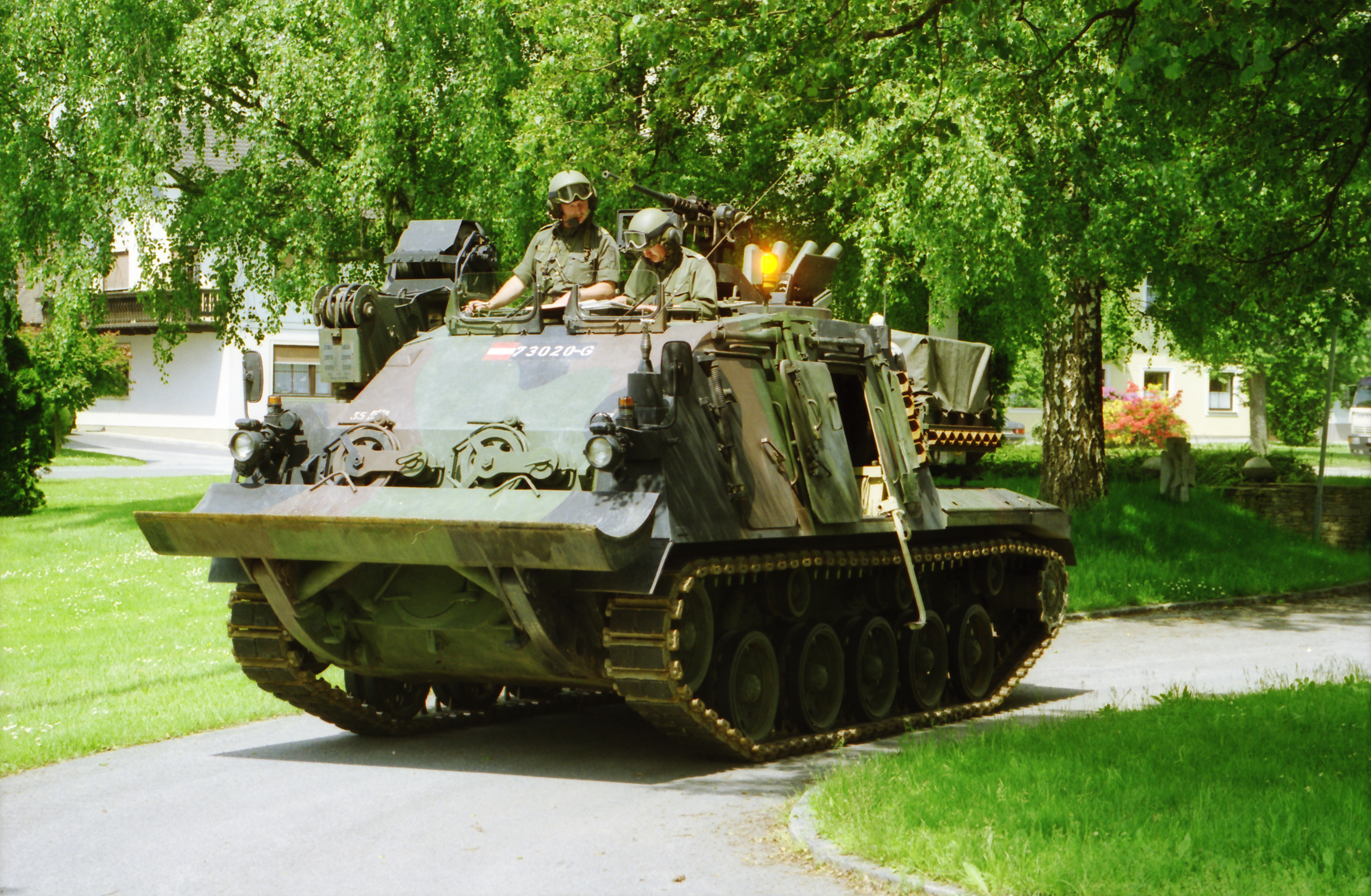 Militärübung 1999 - gepanzerte Kampffahrzeuge, Armored fighting vehicles, Military exercises